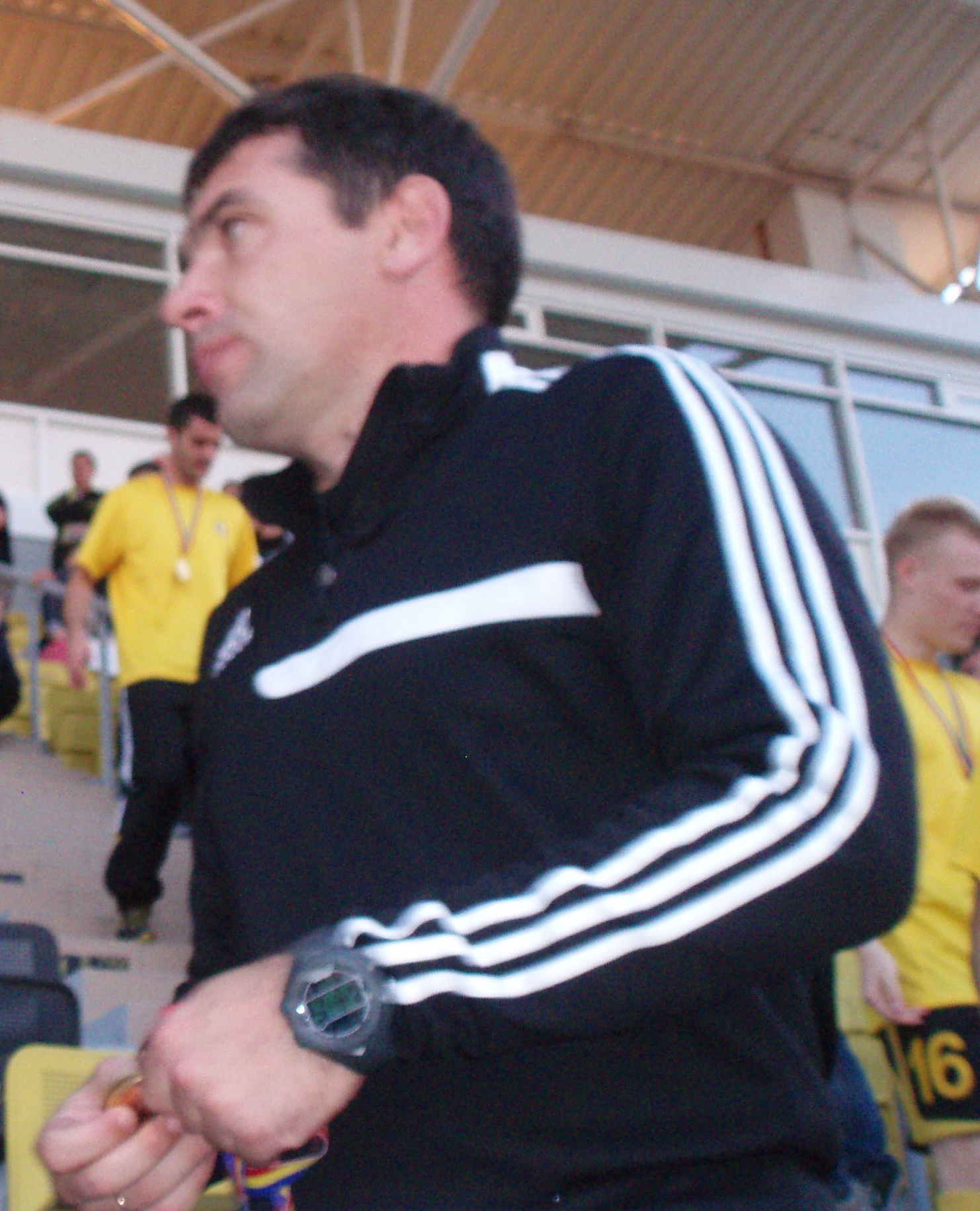 Вячеслав Руснак